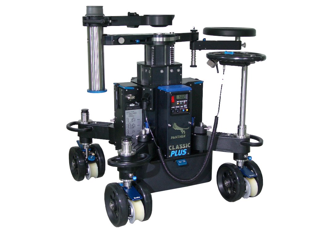 ClassicPlus Dolly